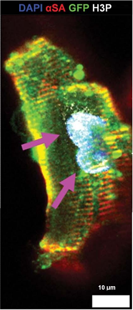 Figura 3C. Recambio de cardiomiocitos endógenos residentes en el corazón de ratón adulto valorado mediante Inmunocitoquímica. Las flechas muestran un cardiomiocito residente cíclico, en una fase de cariocinesis. La inmunocitoquímica de cardiomiocitos disociados enzimáticamente para GFP (un marcador específico para cardiomiocitos endógenos residentes), para αSA actinina sarcomérica α‐ proteína de unión a la actina (un marcador específico para cardiomiocitos endógenos), y para el marcador H3P. Núcleos marcados con DAPI en azul. revela que el corazón adulto joven contiene un pequeño pool de cardiomiocitos residentes cíclicos que se incrementa luego de infarto miocárdico Barra: 10 um.